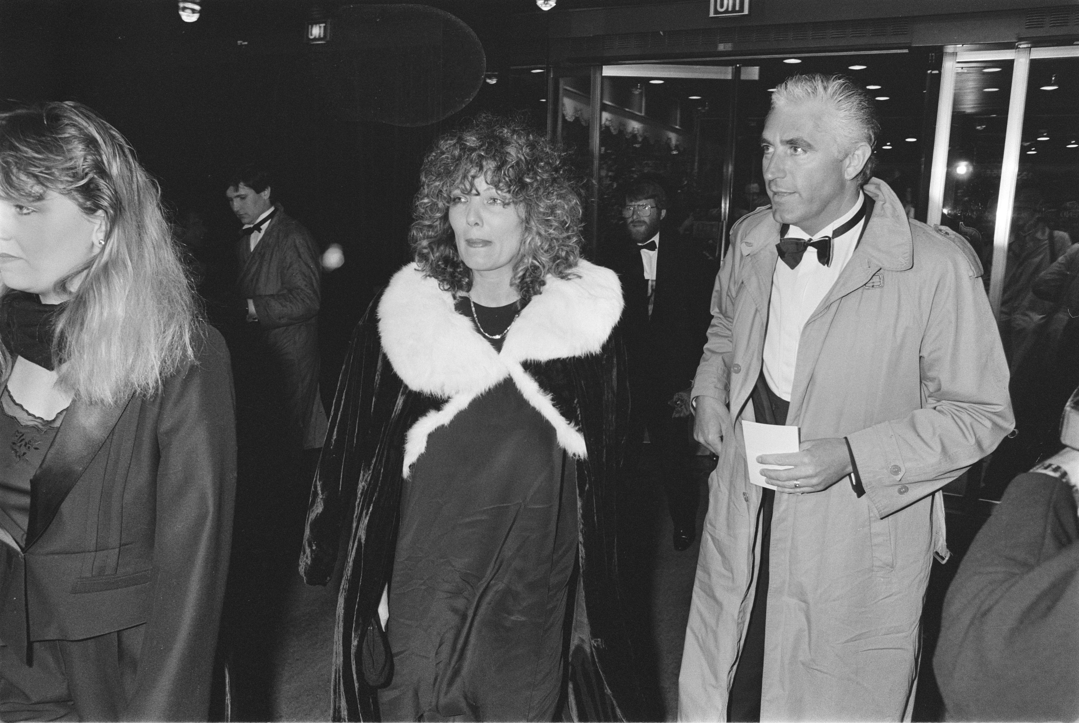 Collectie / Archief : Fotocollectie Anefo Reportage / Serie : Koningin Beatrix en Prins Claus bij de première van de film Ciske de Rat Beschrijving : Willeke van Ammelrooy en Marco Bakker Datum : 27 maart 1984 Persoonsnaam : Ammelrooy, Willeke van, Bakker, Marco Fotograaf : Croes, Rob C. / Anefo Auteursrechthebbende : Nationaal Archief Materiaalsoort : Negatief (zwart/wit) Nummer archiefinventaris : bekijk toegang 2.24.01.05 Bestanddeelnummer : 932-9144